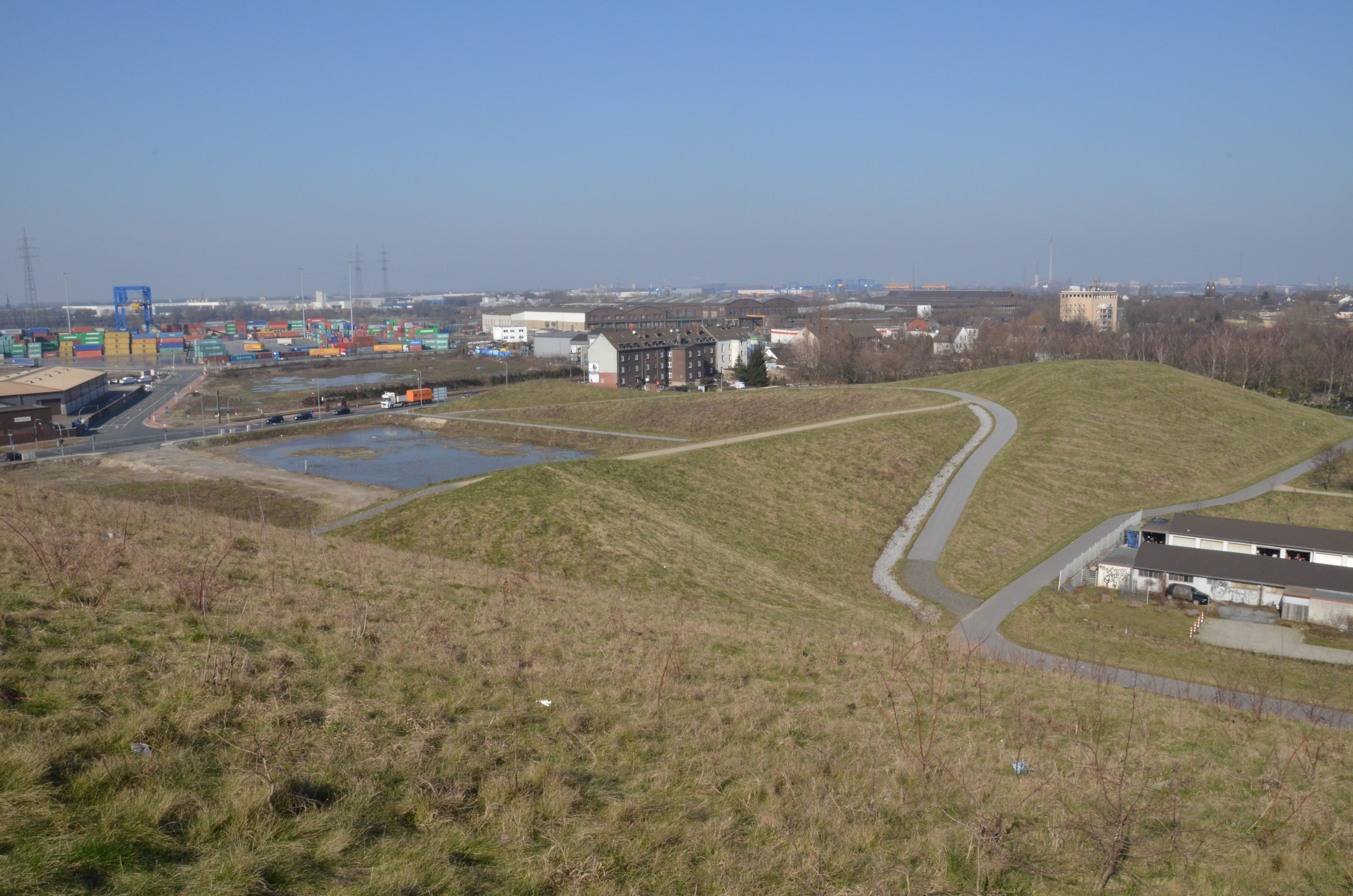 Ausblicke von der Heinrich-Hildebrand-Höhe im Angerpark in Duisburg Angerhausen